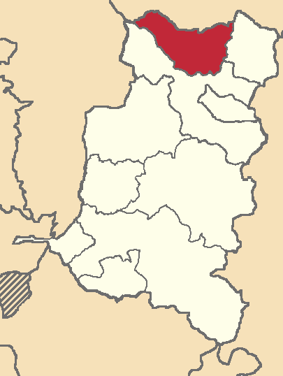 Mapa localizacor del cantón en Chimborazo, Ecuador